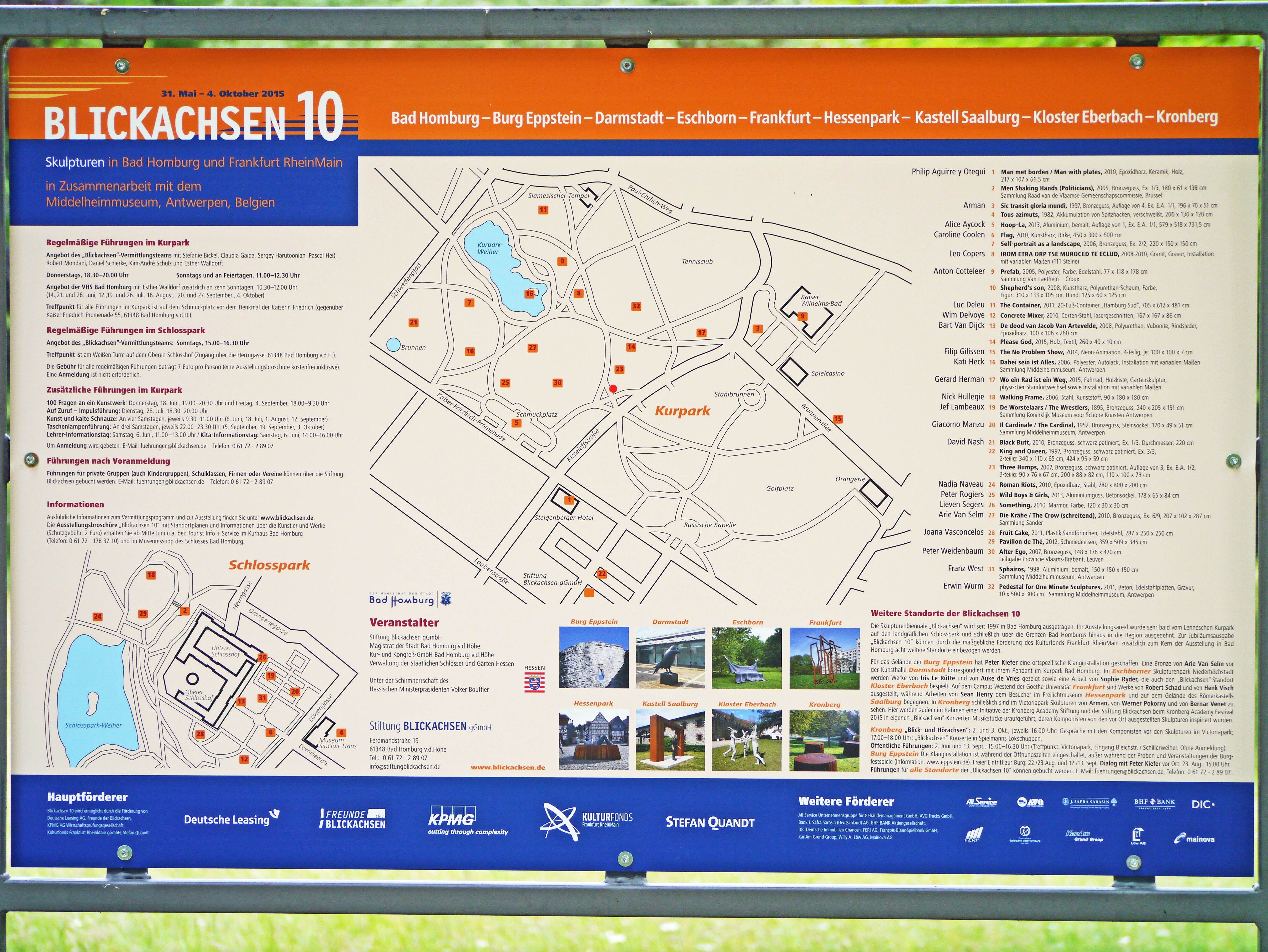 Infotafel zu Blickachsen 10, 2015 im Kurpark Bad Homburg